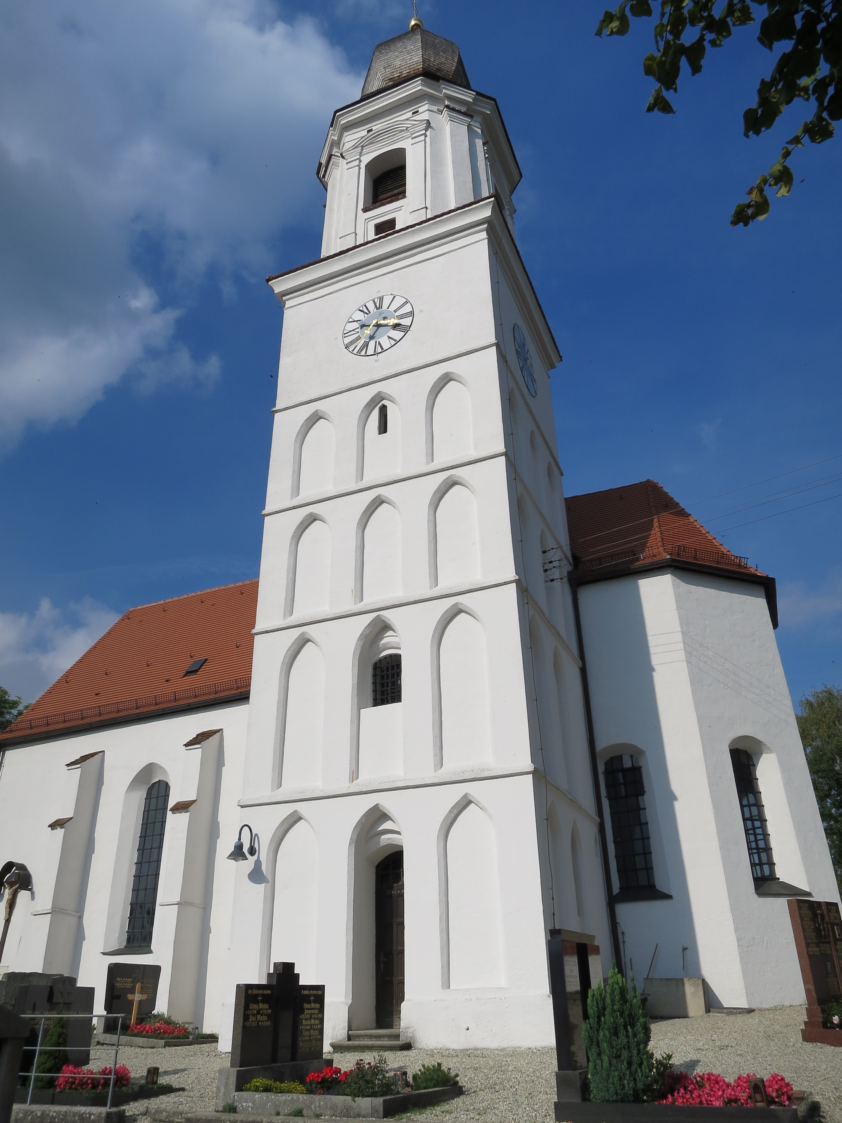 Diese katholische Filialkirche im Ortsteil Tüntenhausen ist ein Saalbau mit stark eingezogenem polygonalem Chor und Chorflankenturm mit Zwiebelhaube, um 1400 erbaut und 1708 barockisiert; mit barocker Ausstattung.This is a photograph of an architectural monument.